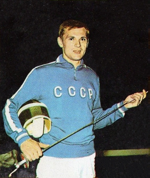 MUNCHEN/MONACO '72-PANINI-Figurina n.31- STANKOVIC - URSS - SCHERMA -Rec